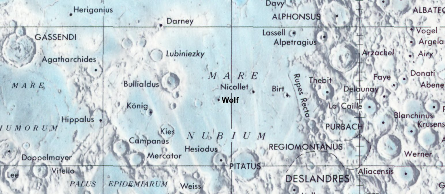 Cráter lunar Wolf. Localización. (Lunar Chart LPC1. Second Edition)